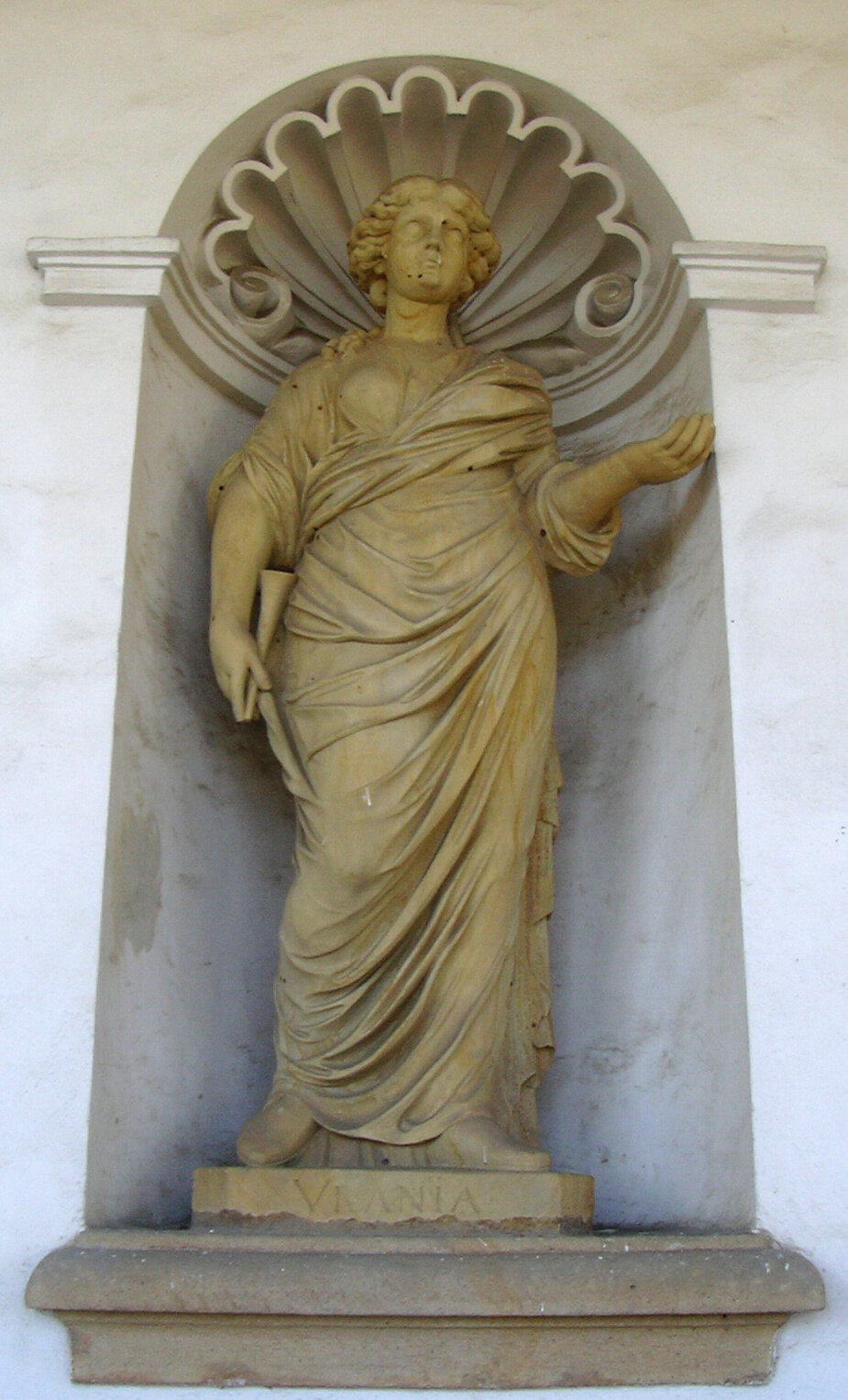 Urania - socha Kroměříž Květná zahrada